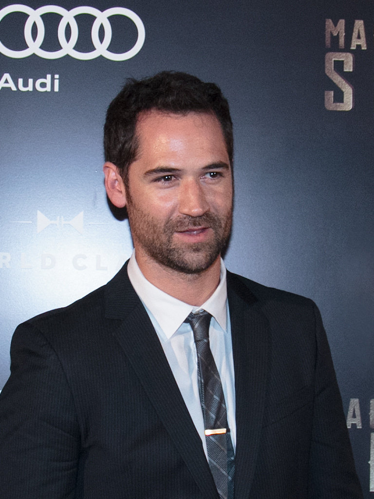 Toronto International Film Festival 2016